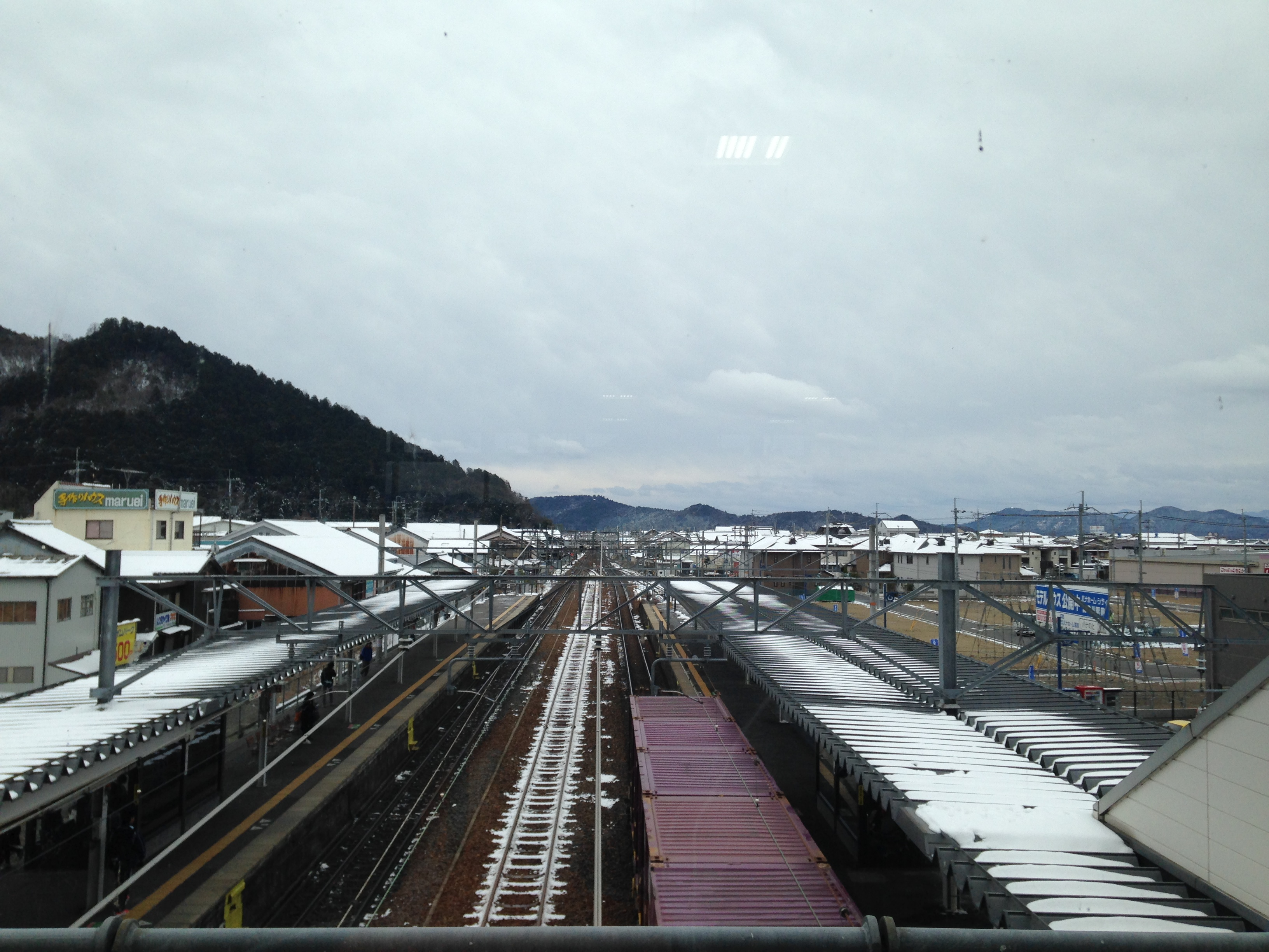 能登川駅の跨線橋より東海道本線・安土方面を望む